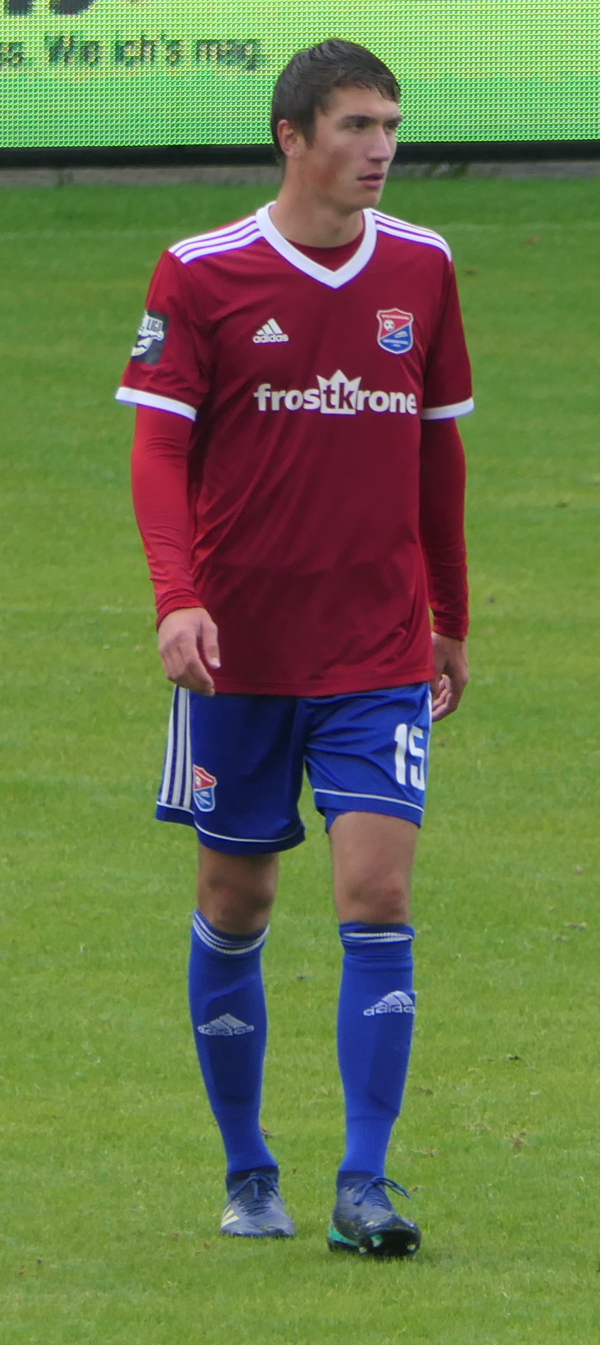 Der Fussballprofi Christoph Greger im Trikot der SpVgg Unterhaching beim Heimspiel gegen Eintracht Braunschweig am 01.09.2018.